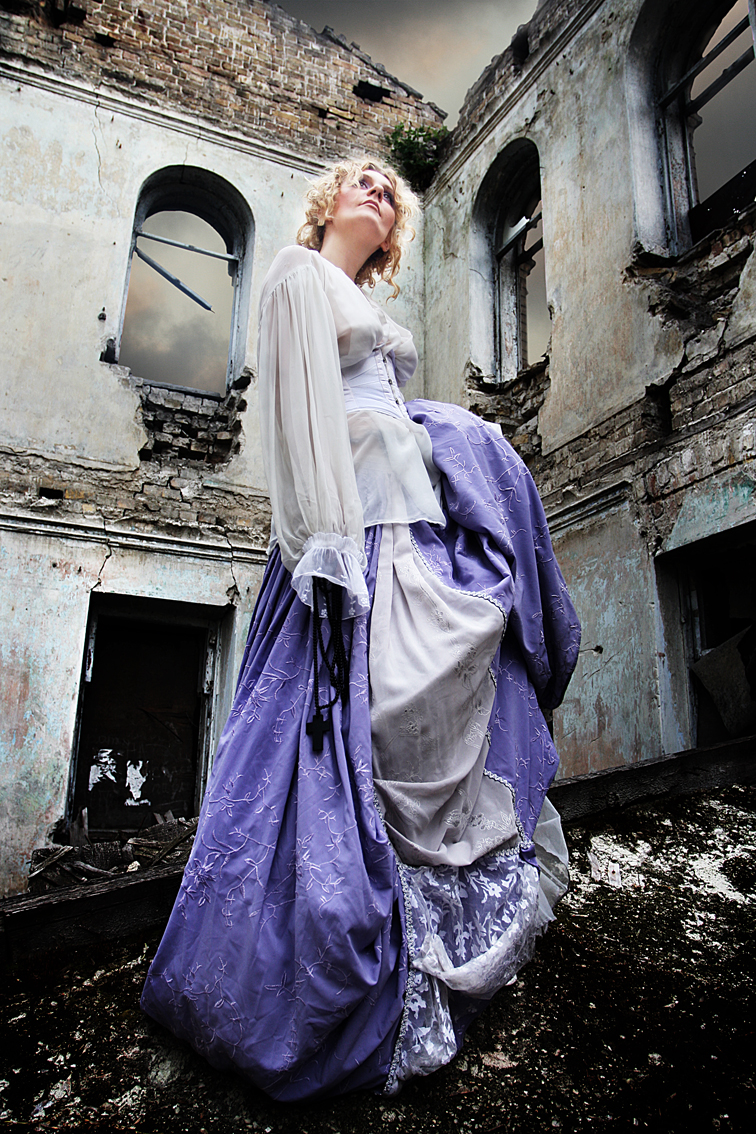 Екатерина Кистень